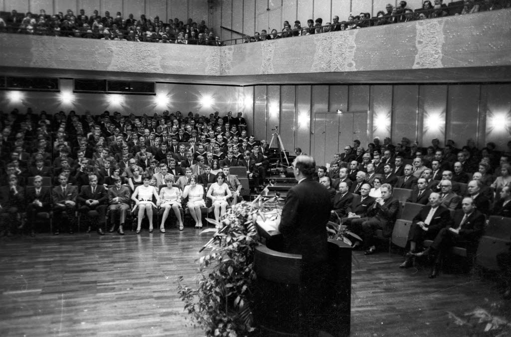 359 gewerbliche Lehrlinge und Anlernlinge werden freigesprochen.